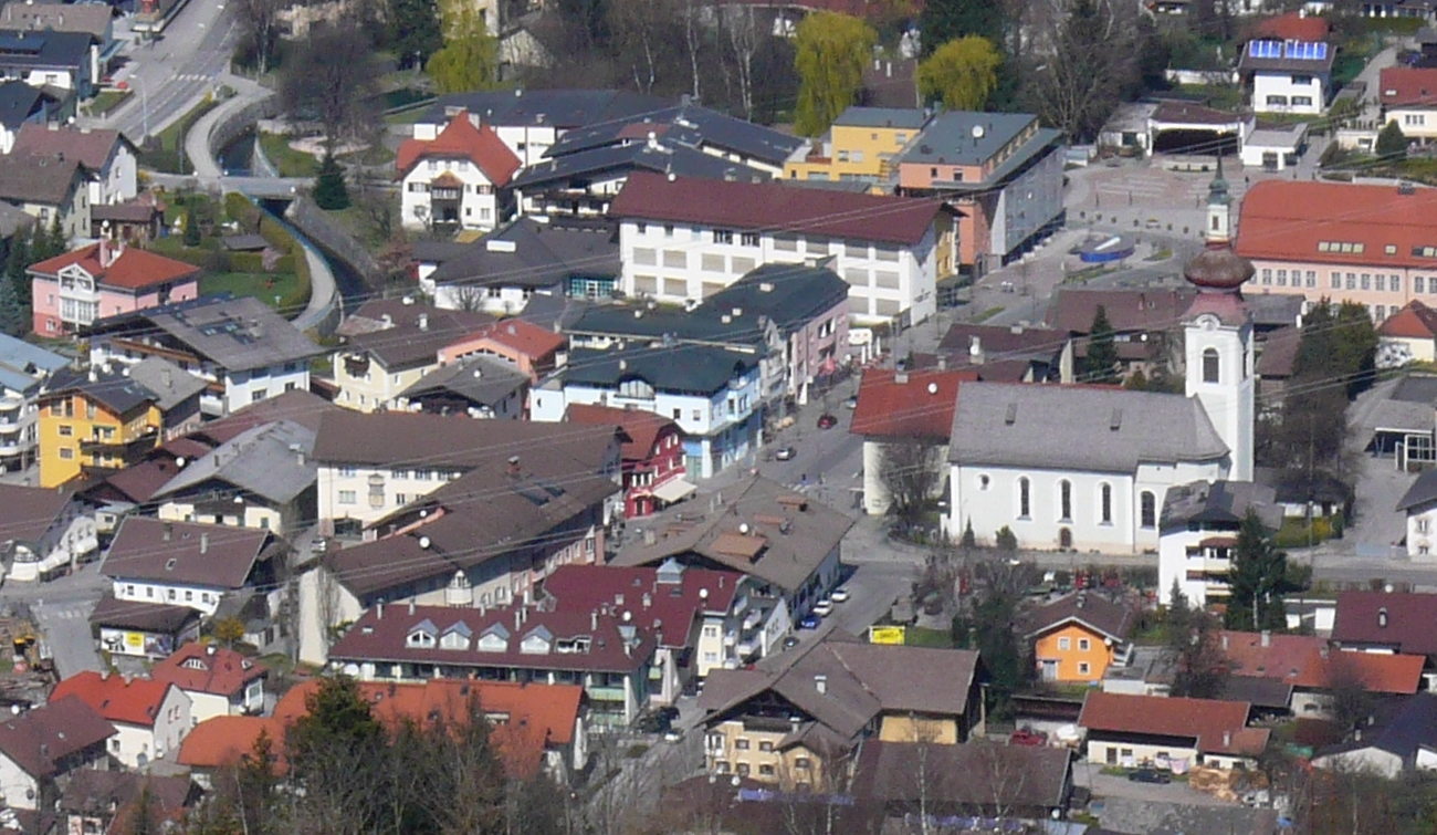 Wattens ancient Laurentiuskirche